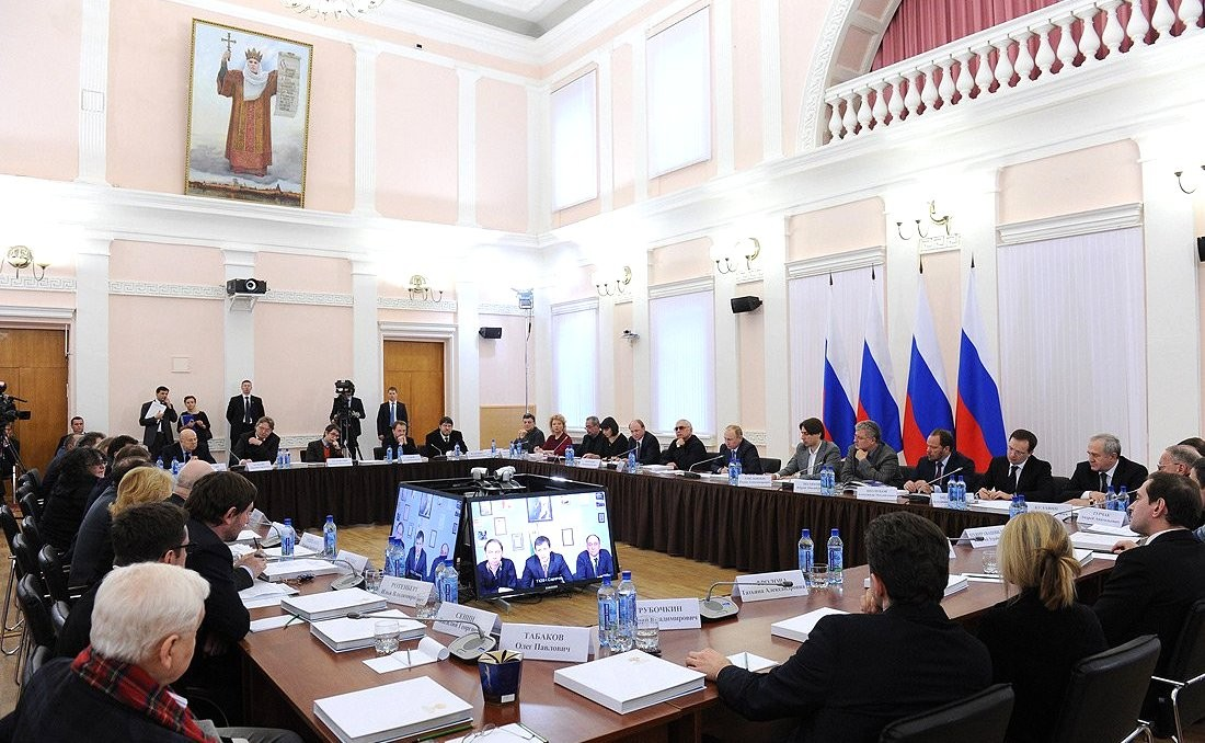 Заседание президиума президентского Совета по культуре и искусству